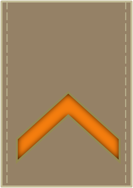 Saudi Arabian military ranks (First Class Private). جندي أول